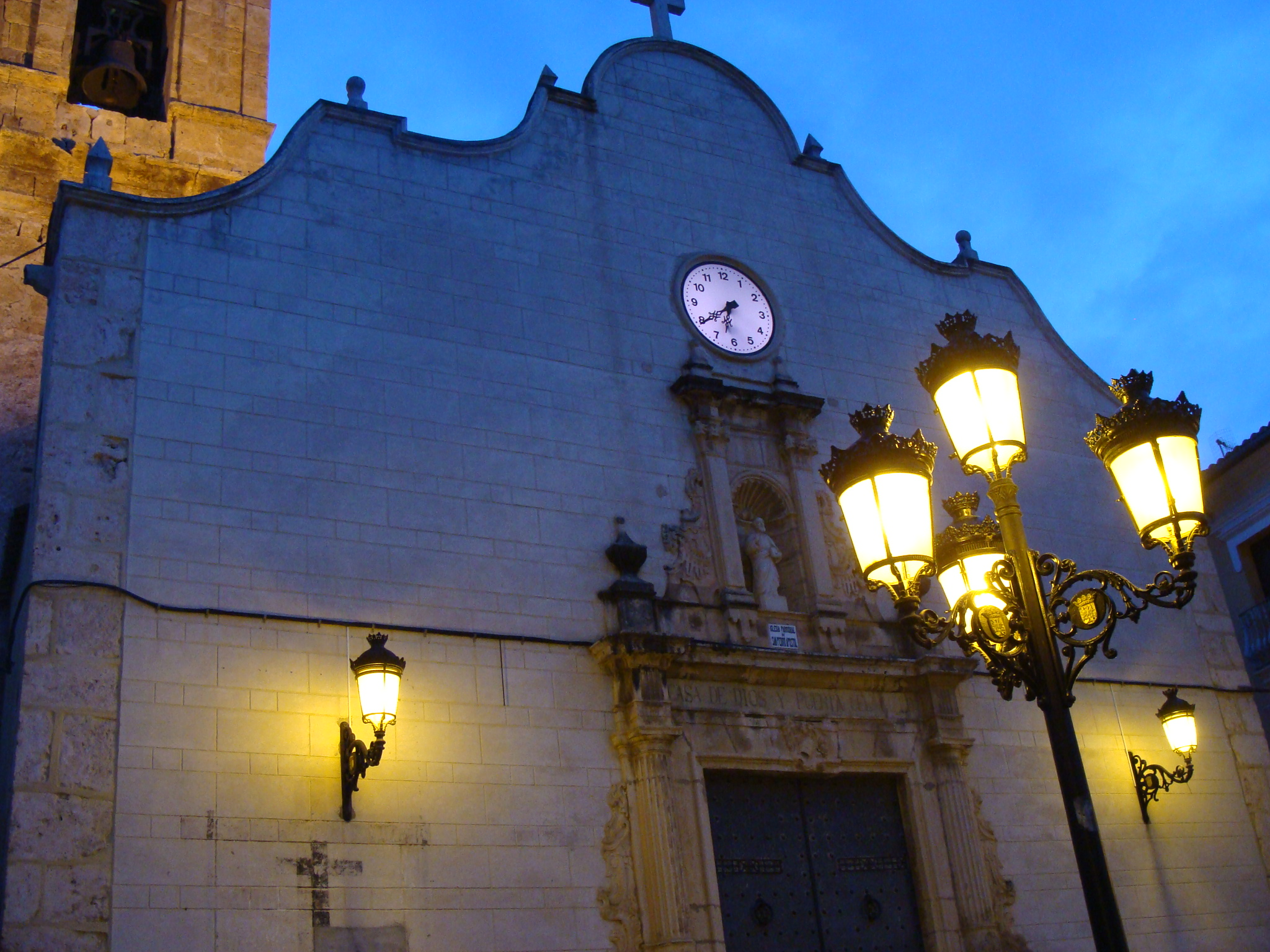 La fachada de la iglesia de Catadau (Valencia)